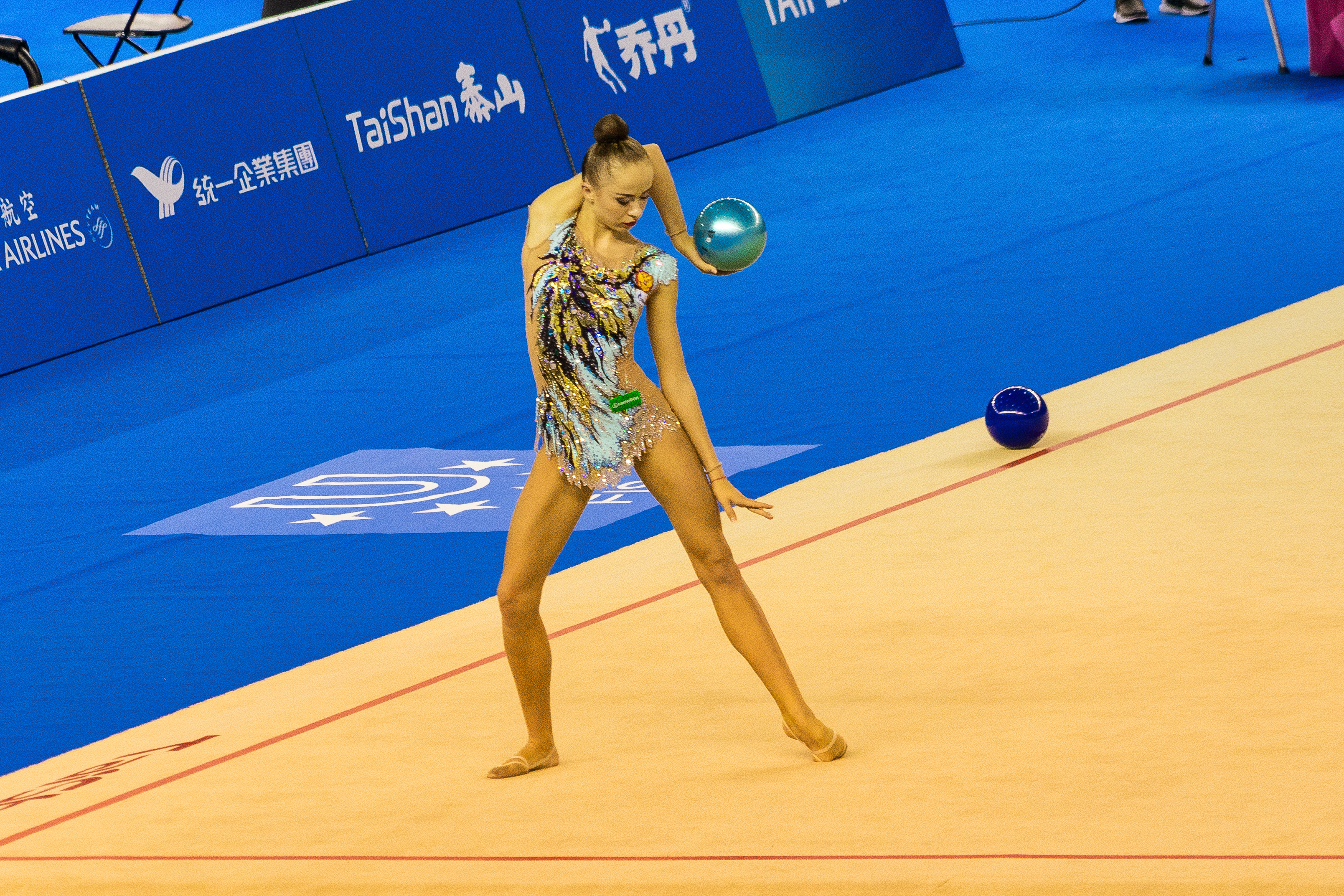 2017 Taipei Summer Universiade